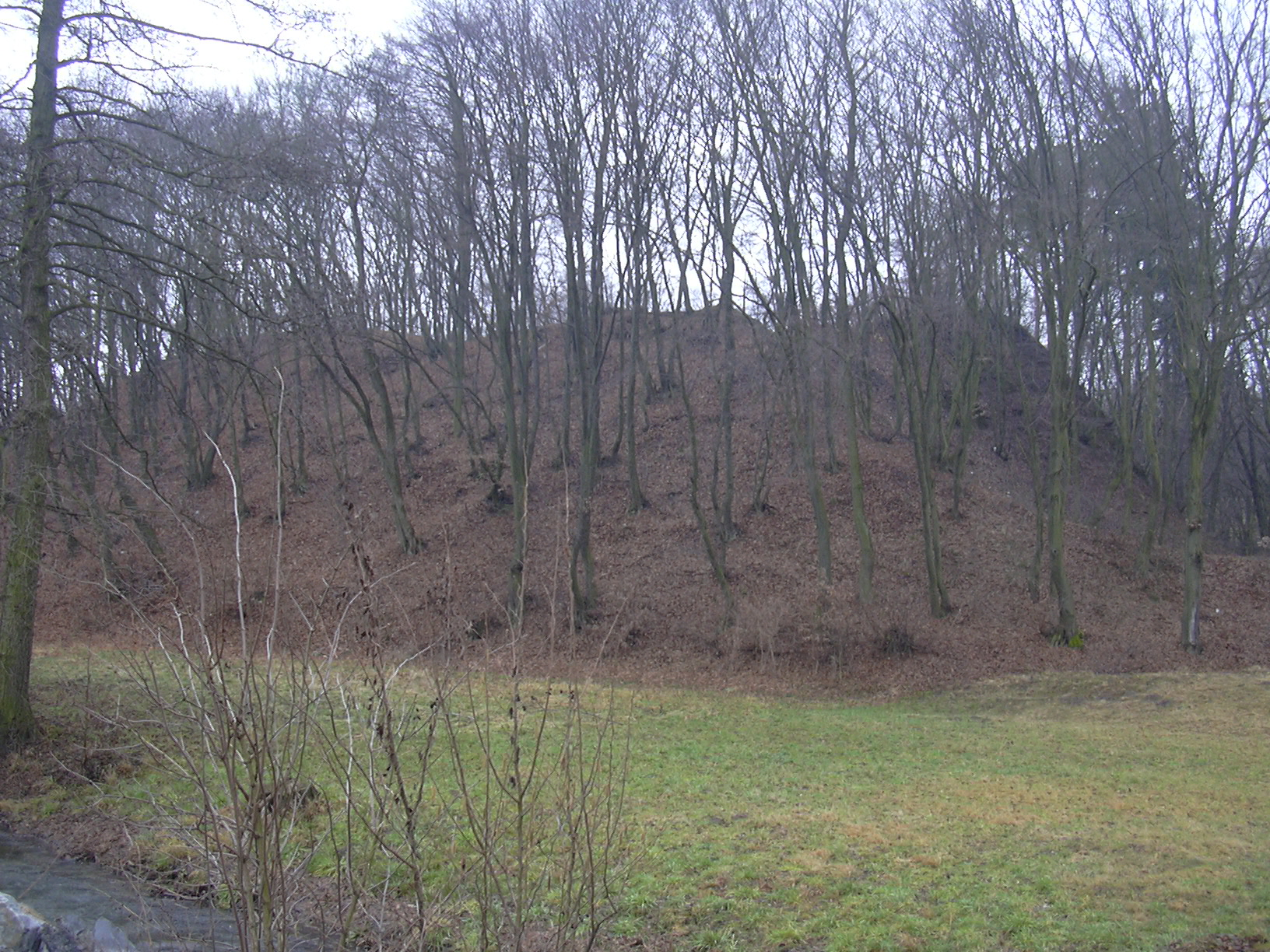 Val se zříceninou Dědice (Vyškov- czech republic)